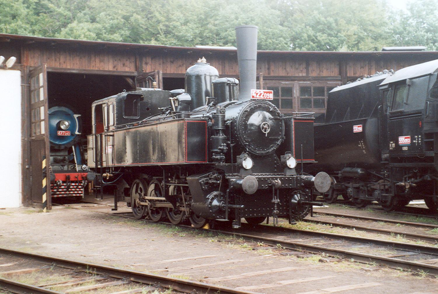 422.098 vor dem Ringlokschuppen